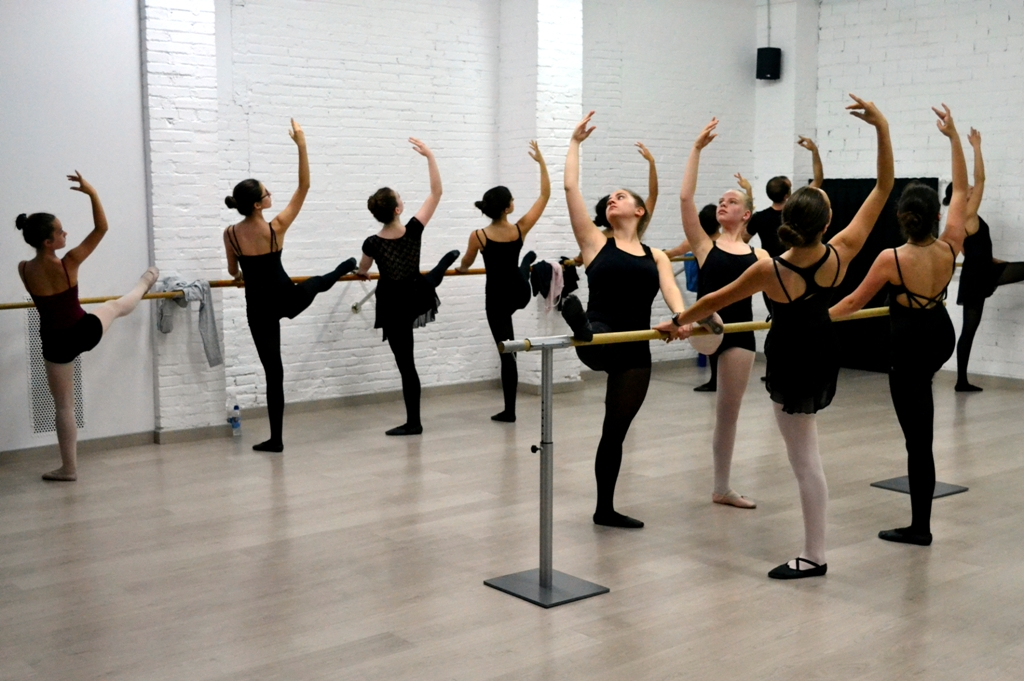 Classe de ballet clàssic a BCM